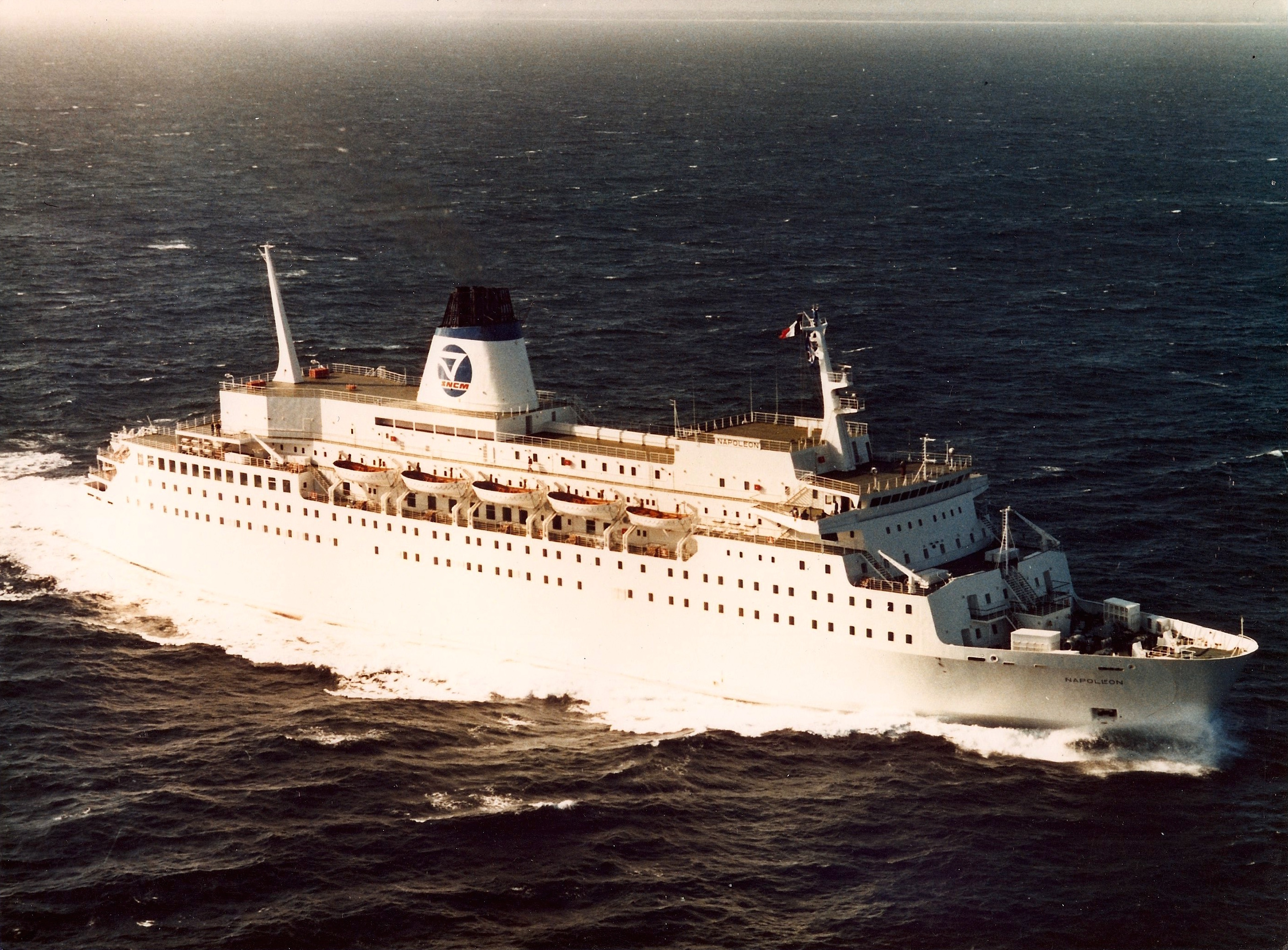 Le car-ferry Napoléon durant ses essais en mer au large de Nantes.